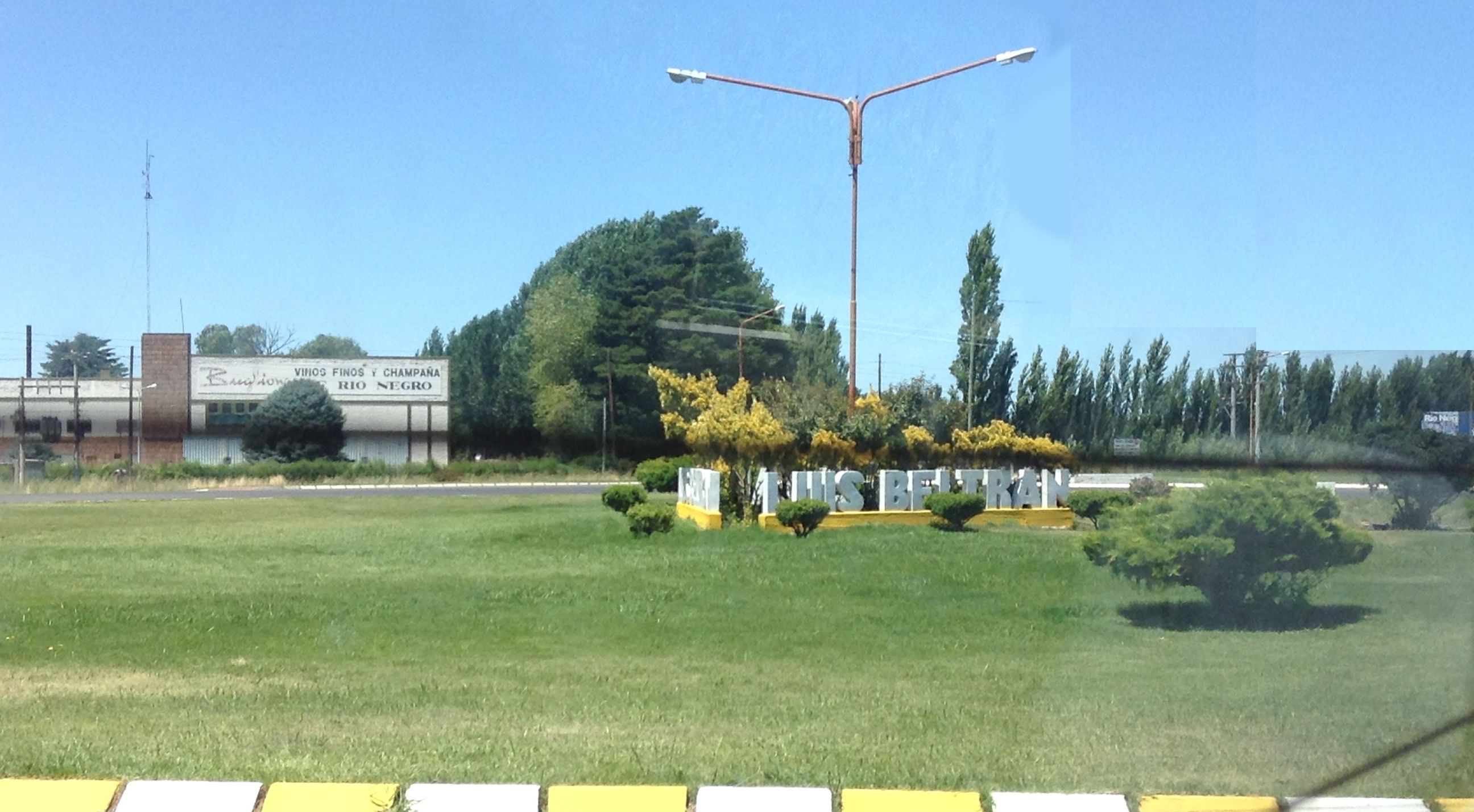 Letrero indicando el nombre de Luis Beltrán, una ciudad en Río Negro, Argentina